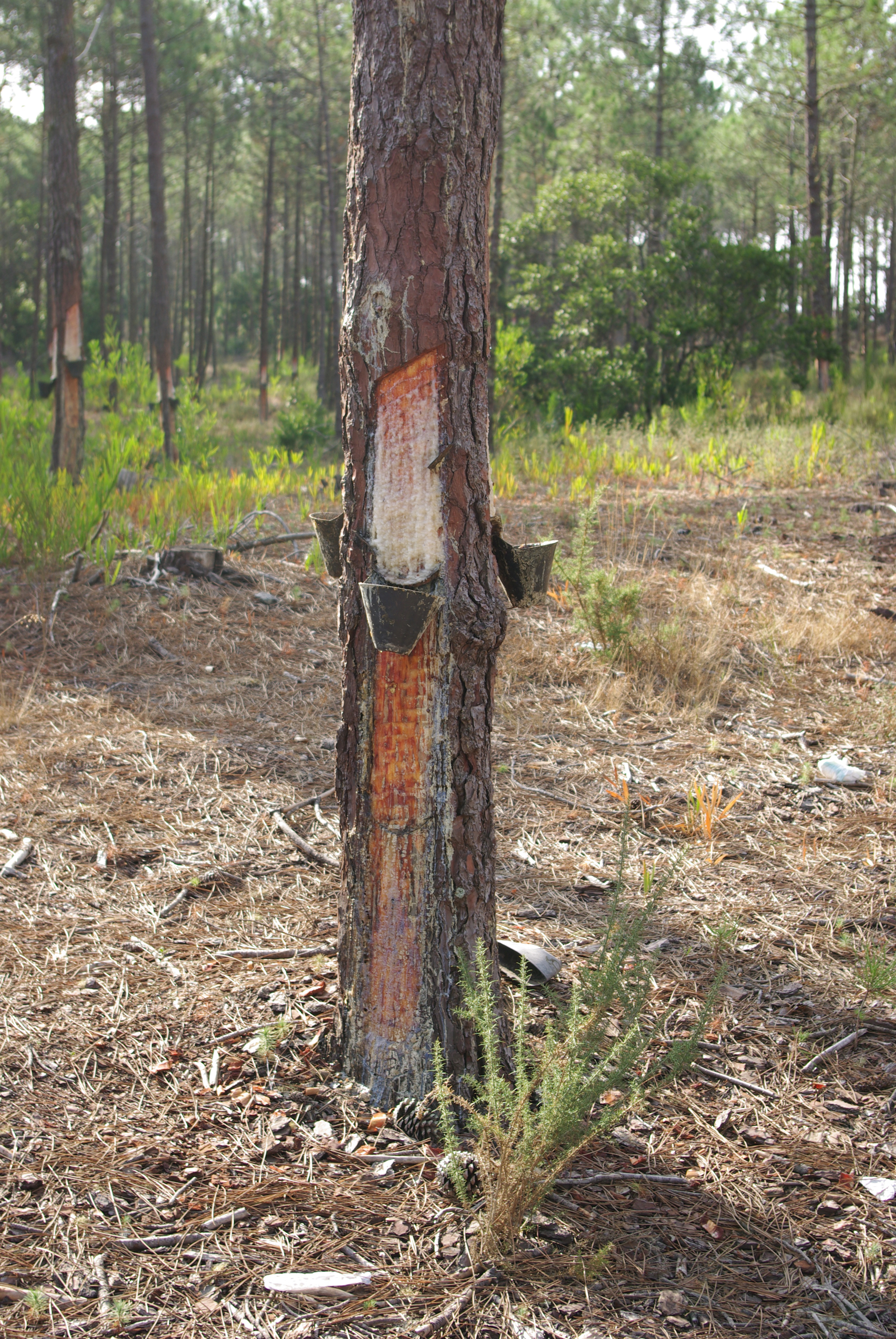 La récolte de sève de pin, près de Nazaré au Portugal